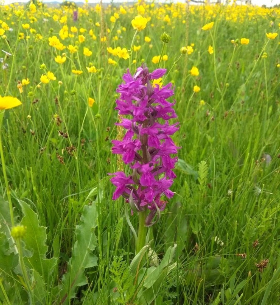 Snapdragon growing in Eastern Siberia